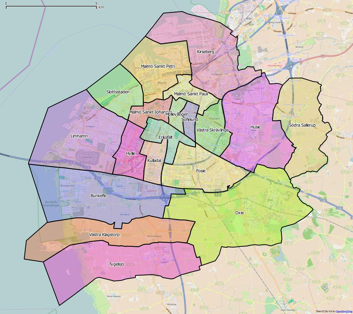 Distriktsindelningen i Malmö kommun World file: 30.55624591416969693 0 0 -30.55624591416969693 1431066.18845626944676042 7488463.39163889177143574